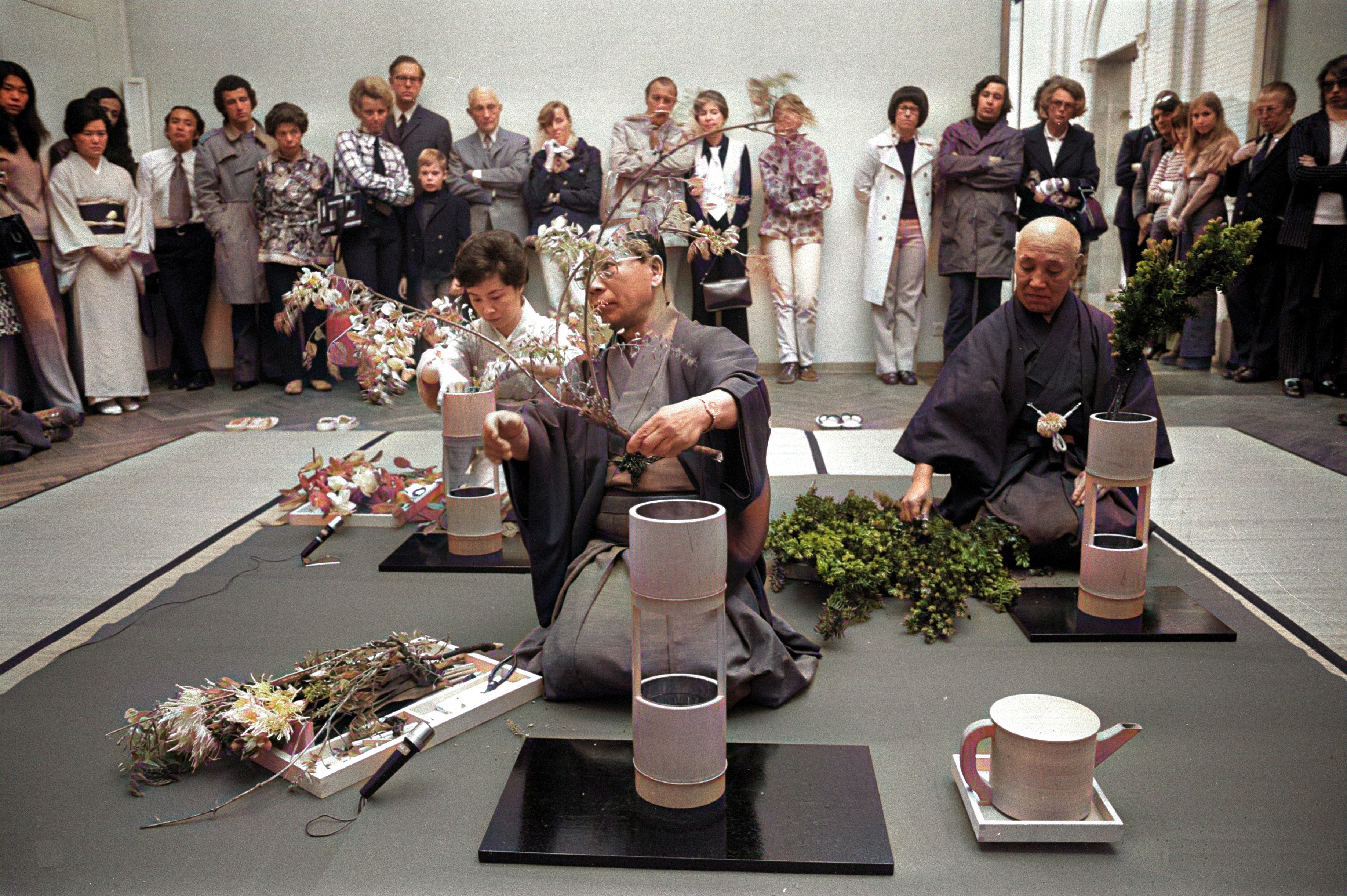 Collectie / Archief : Fotocollectie Anefo Reportage / Serie : Demonstratie Ikebana door Japanse bloemschikkers in het Stedelijk Museum Beschrijving : Bezoekers van het museum kijken toe Datum : 12 mei 1972 Locatie : Amsterdam, Noord-Holland Trefwoorden : bloemsierkunst, demonstraties, musea Fotograaf : Bert Verhoeff / Anefo Auteursrechthebbende : Nationaal Archief Materiaalsoort : Negatief (zwart/wit) Nummer archiefinventaris : bekijk toegang 2.24.01.05 Bestanddeelnummer : 925-5955